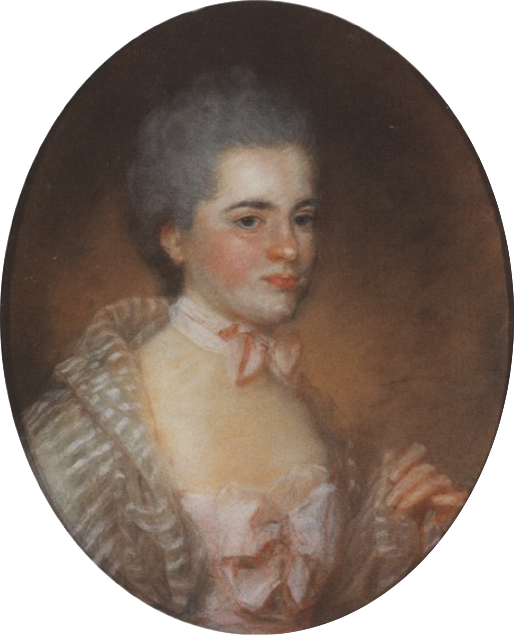 Mme François-Louis de Barville, née Anne Boyetet de Boissy (1750–1839)